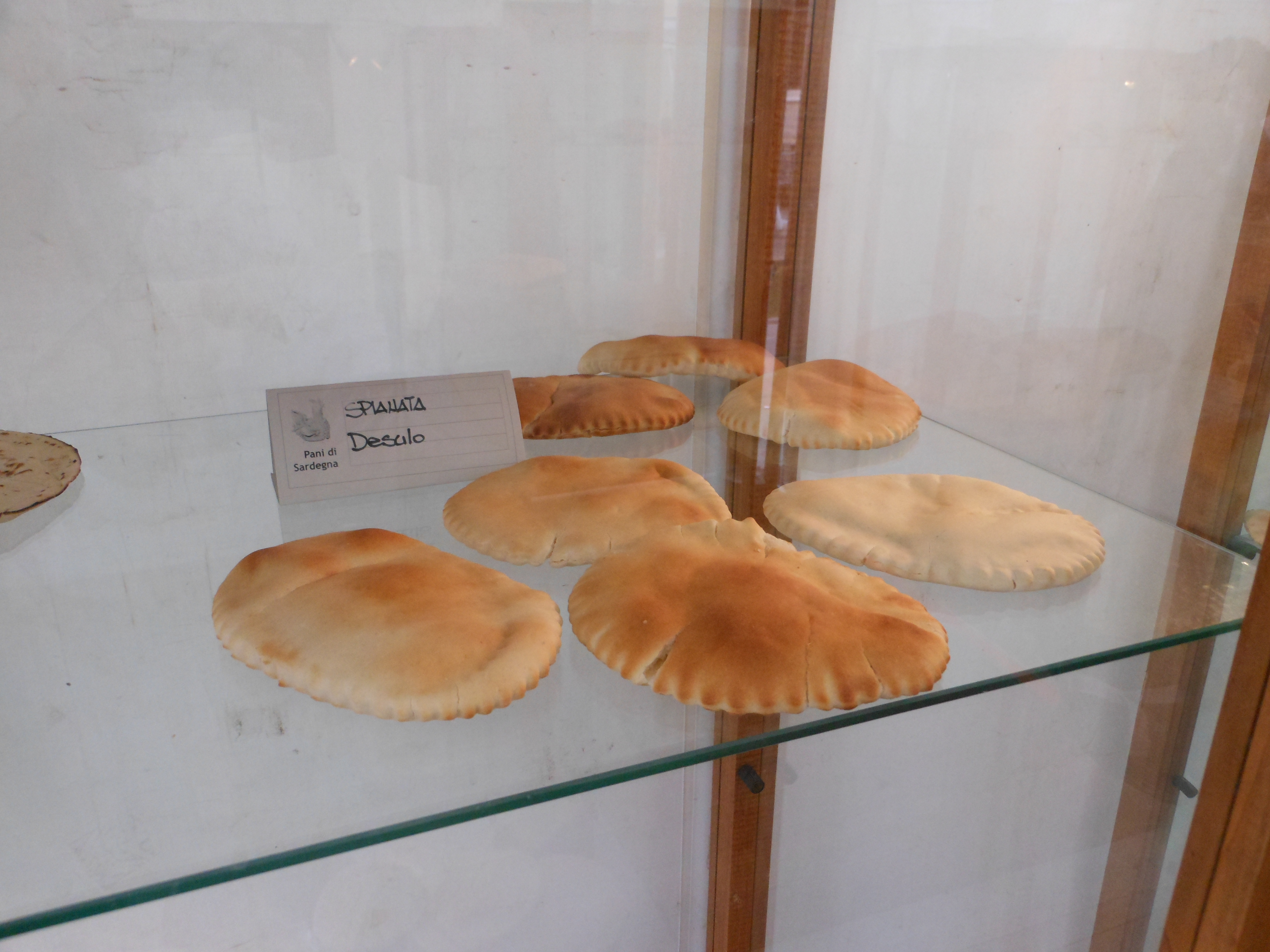 Pane tradizionale